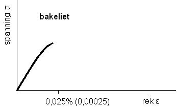 spanning_rek_diagramma_bakeliet.PNG zelf, autoCAD+paint MADe 20 jun 2005 10:27 (CEST)